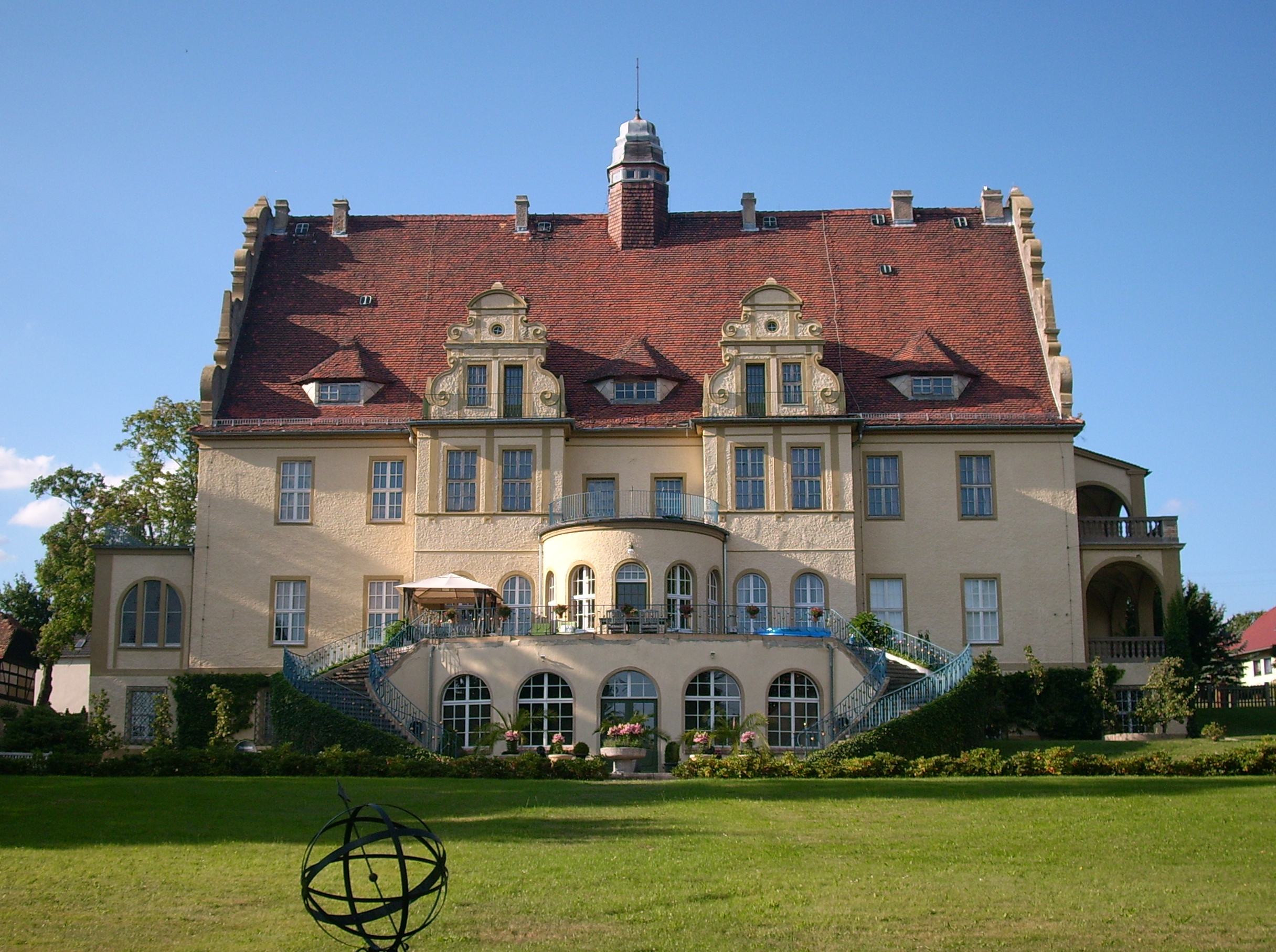 Schloss in Weißig, Ortsteil von Oßling Hornjoserbsce: Wysočanski hród w gmejnje Wóslink